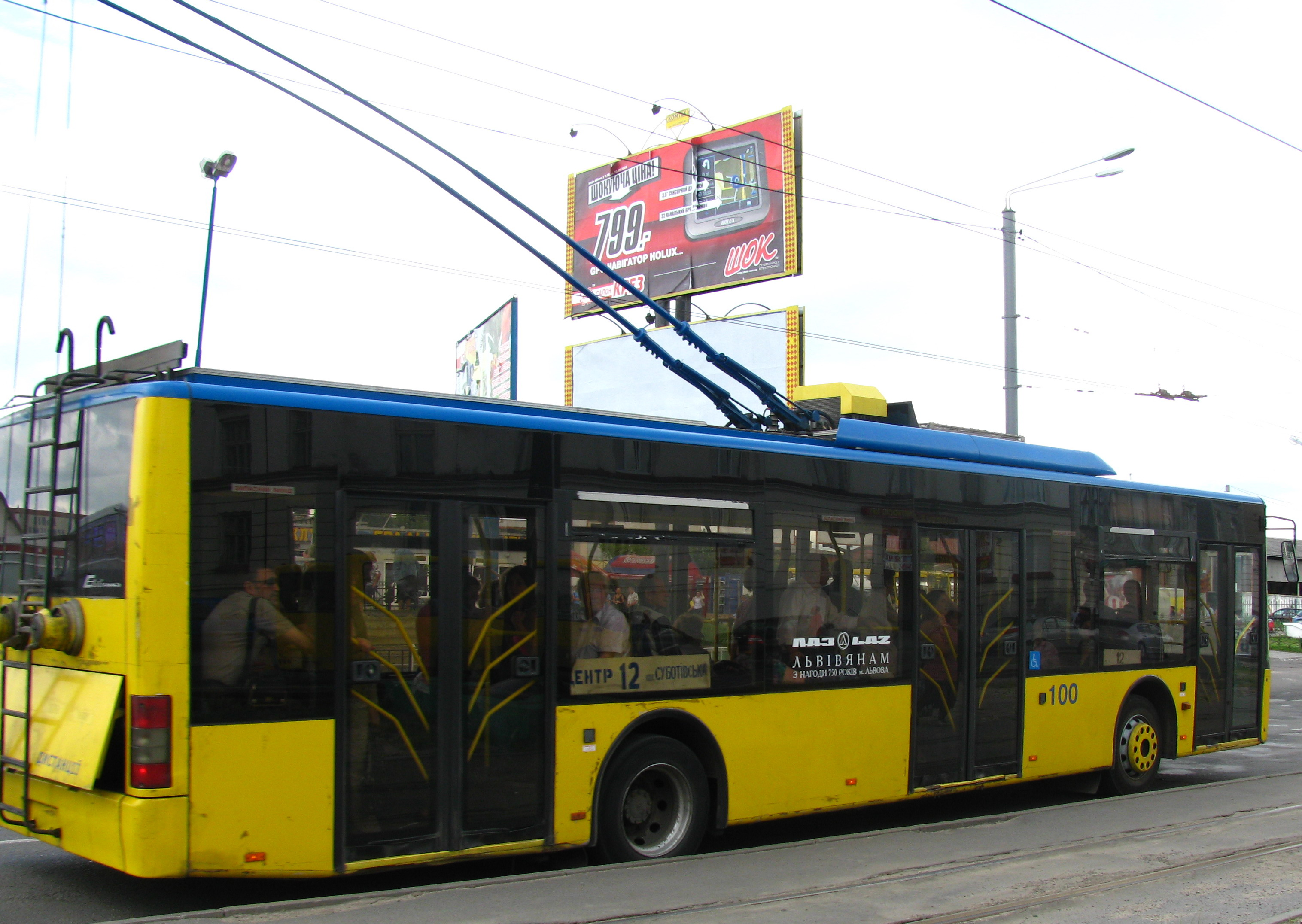 Вигляд ззаду ЕлектроЛАЗ-12.jpg